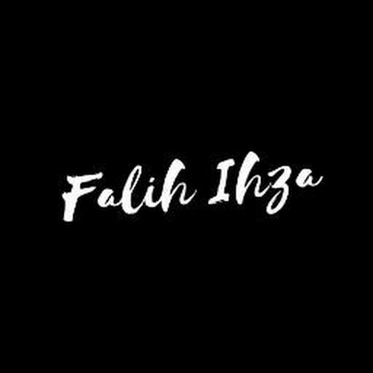 Logo Falih Ihza